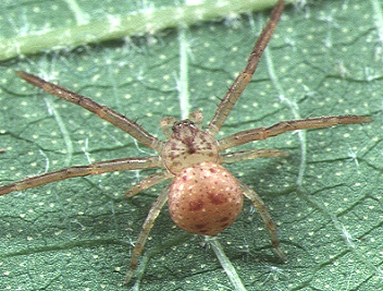 juvenile Pharta brevipalpus from Okinawa.